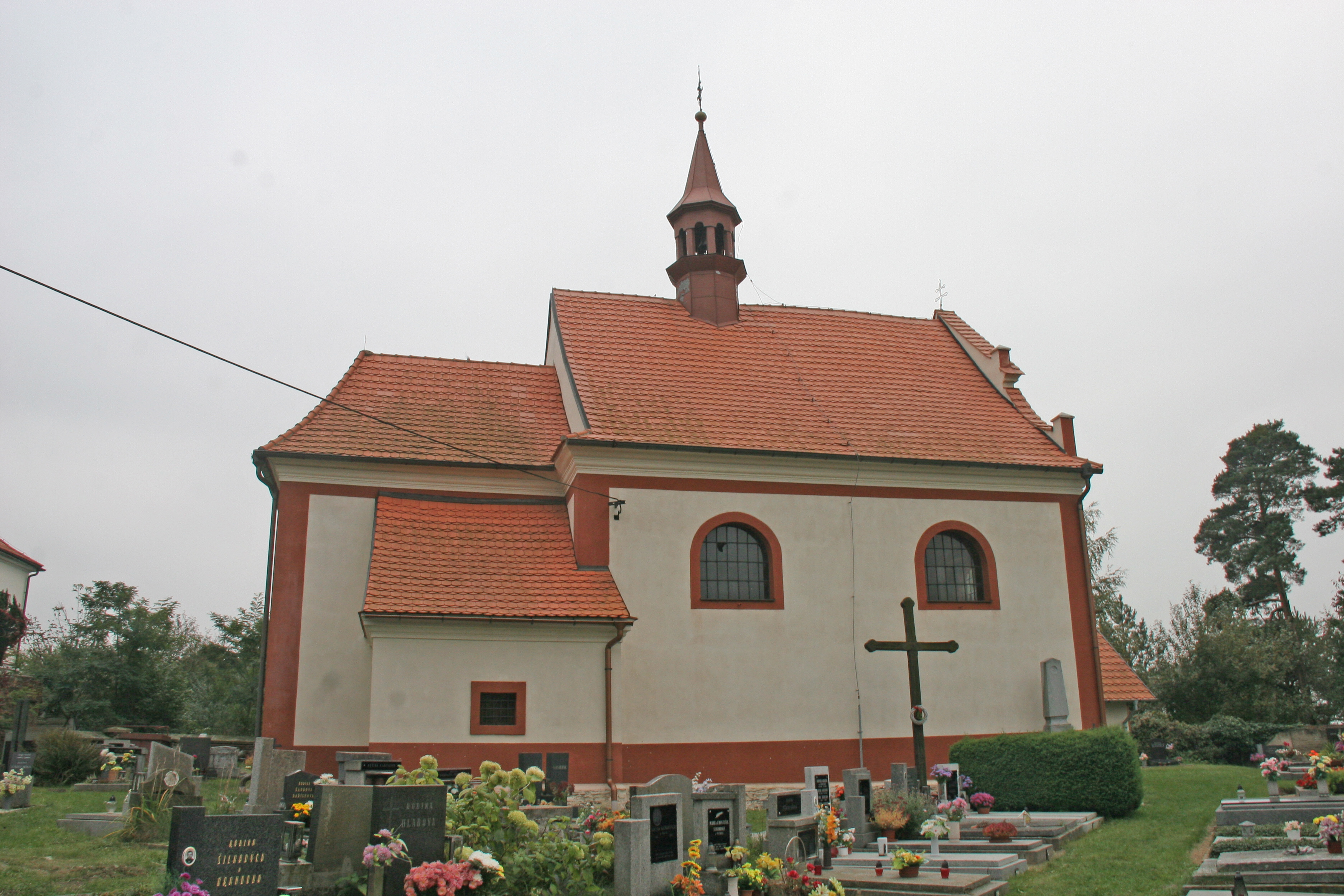 Kostel svatého Havla, Rasochy.